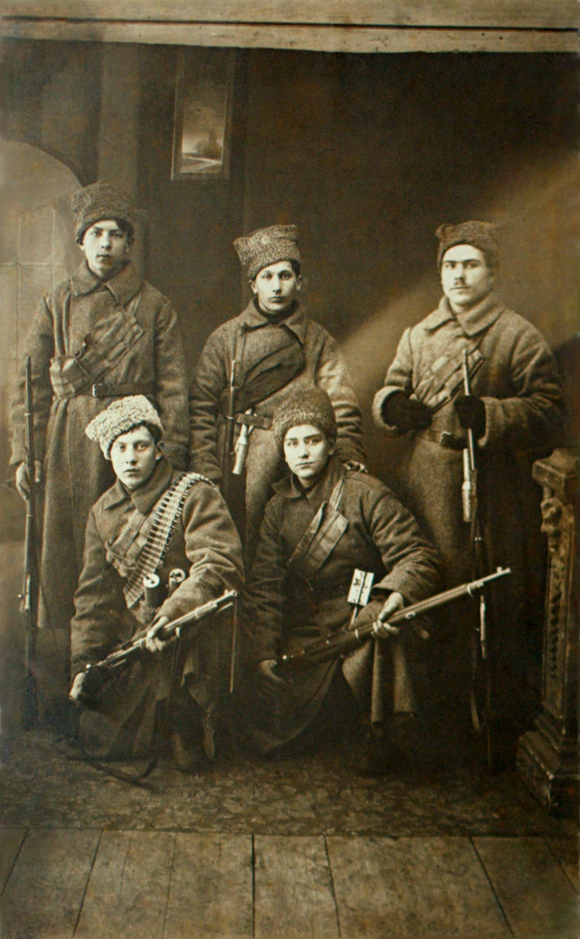 Группа красноармейцев завода "Русский рено" (Большой Сампсониевский пр., 69.) перед отправкой на борьбу с Калединым, Петроград, 1918